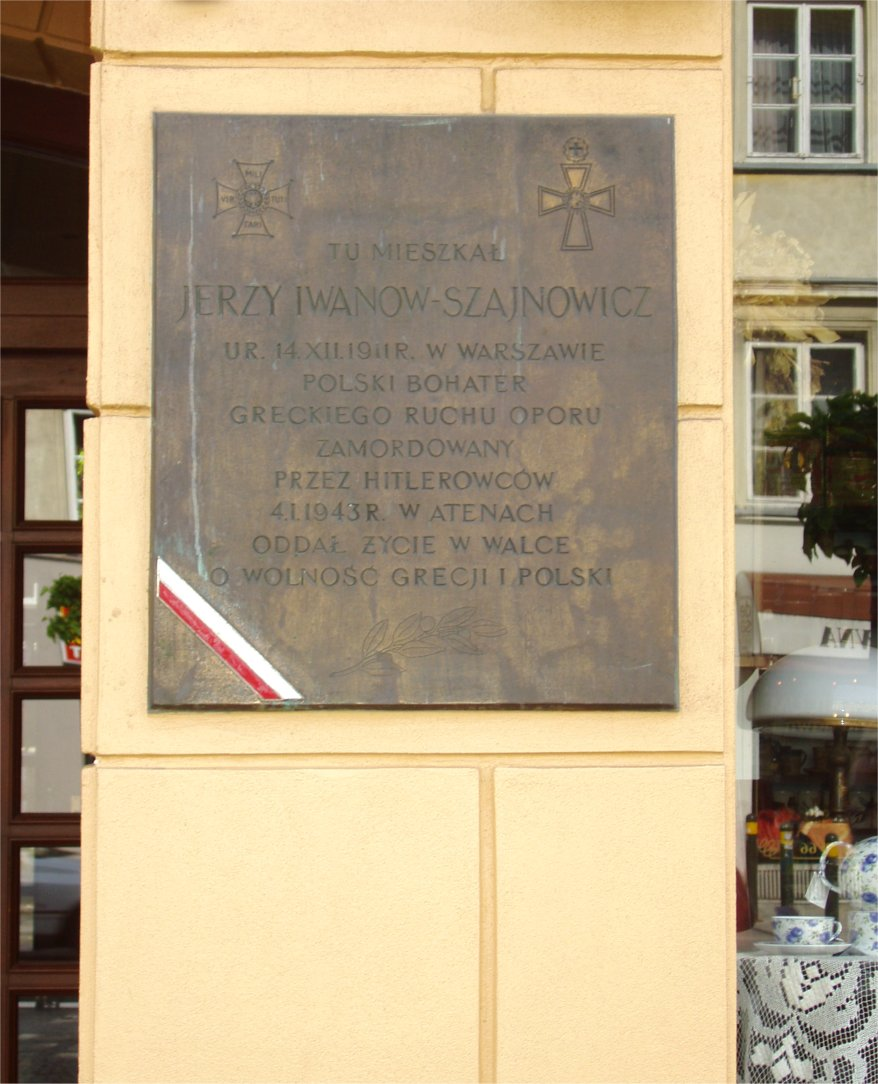 Czasowe miejsce zamieszkania Jerzego Iwanowa-Szajnowicza, przy ul. Nowy Świat w Warszawie (fot Zu)